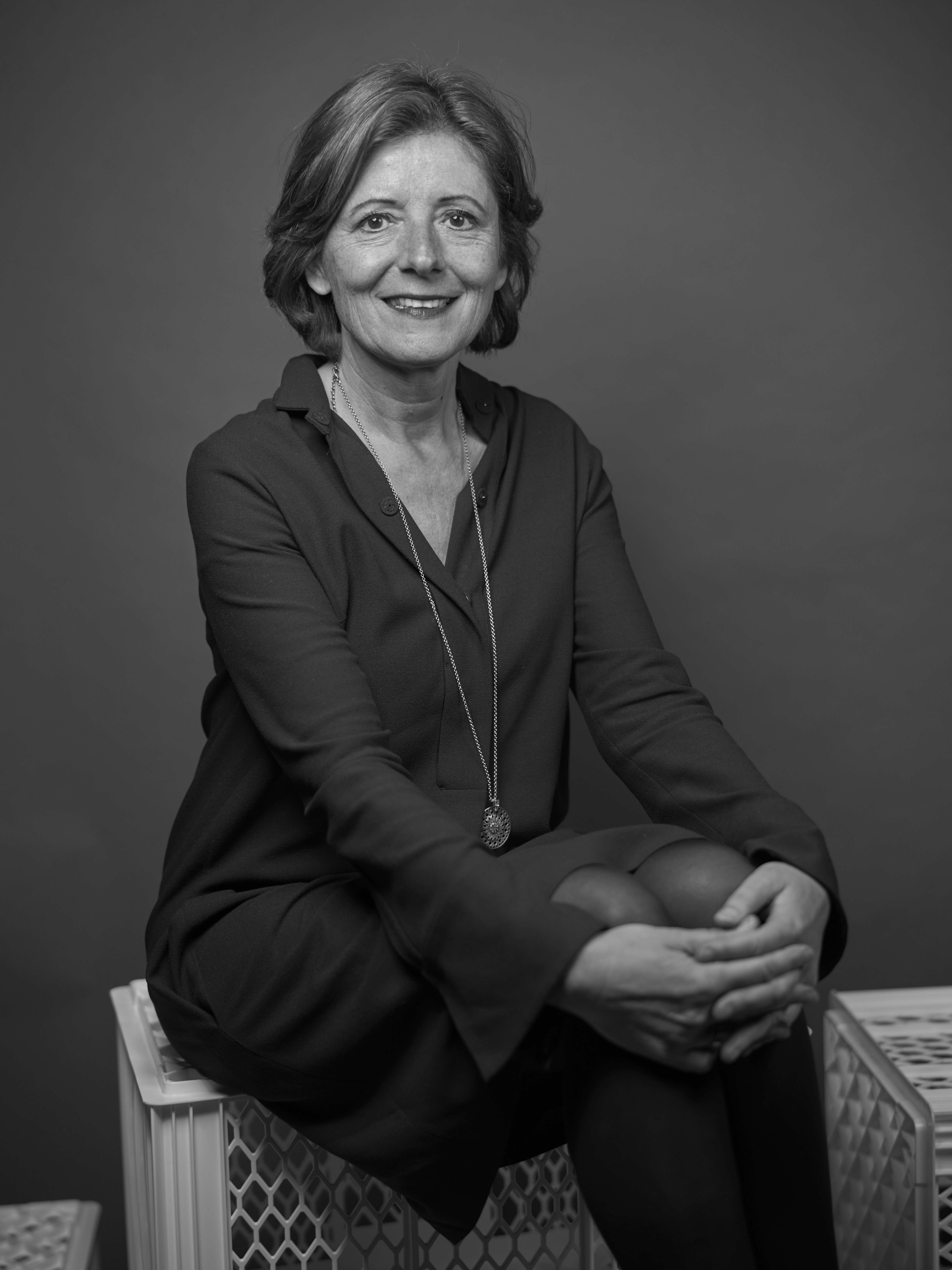 Speakerin Malu Dreyer